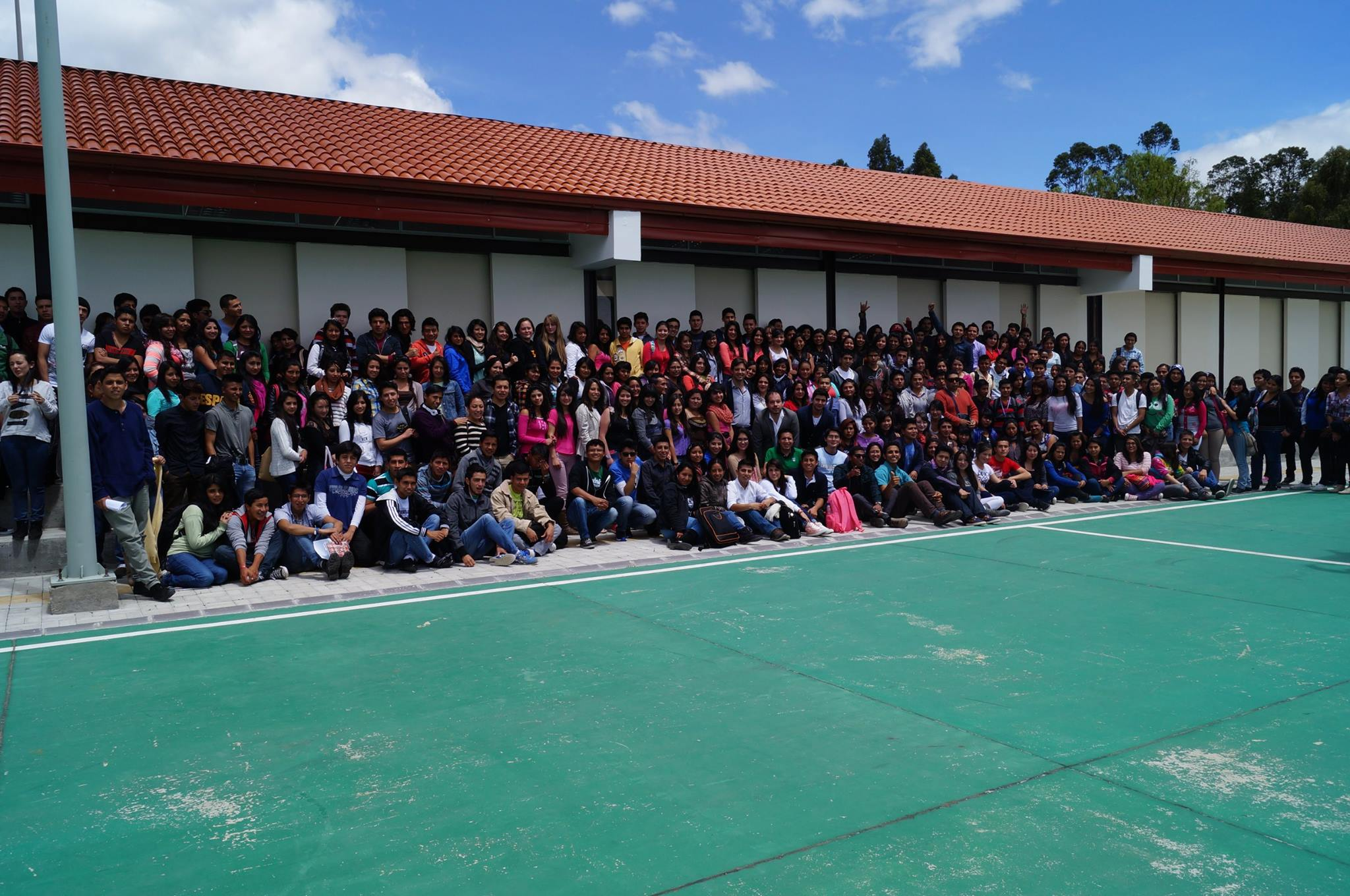 La nueva promoción de estudiantes en la UNAE